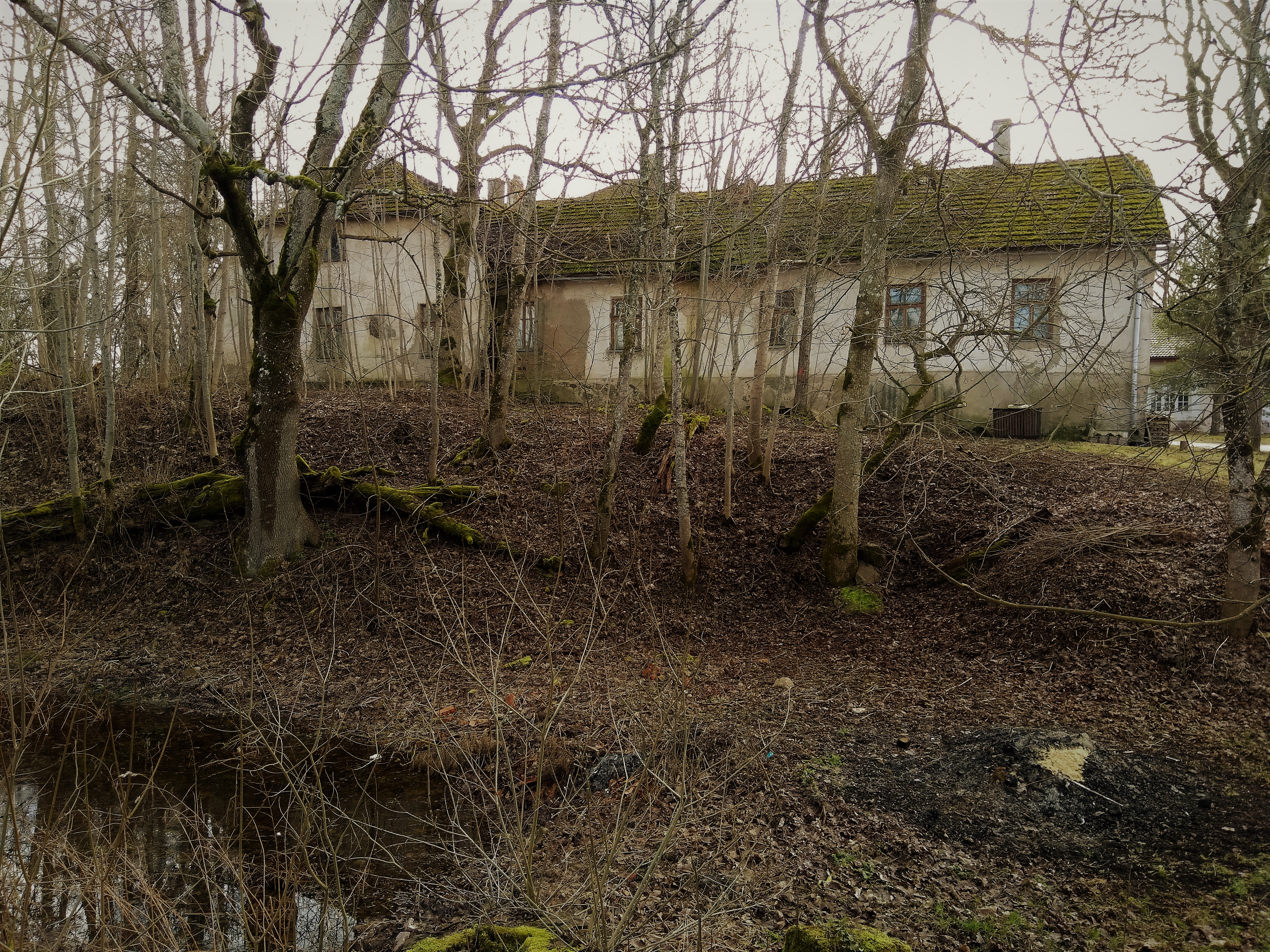 Vaade üle põhjapoolse vallikraavi linnuseala põhjavallile ja mõisaehitistele edelast. Vasakule jääb vana puidust mõisahäärberi ots ja paremale veidi uuem majandushoone.